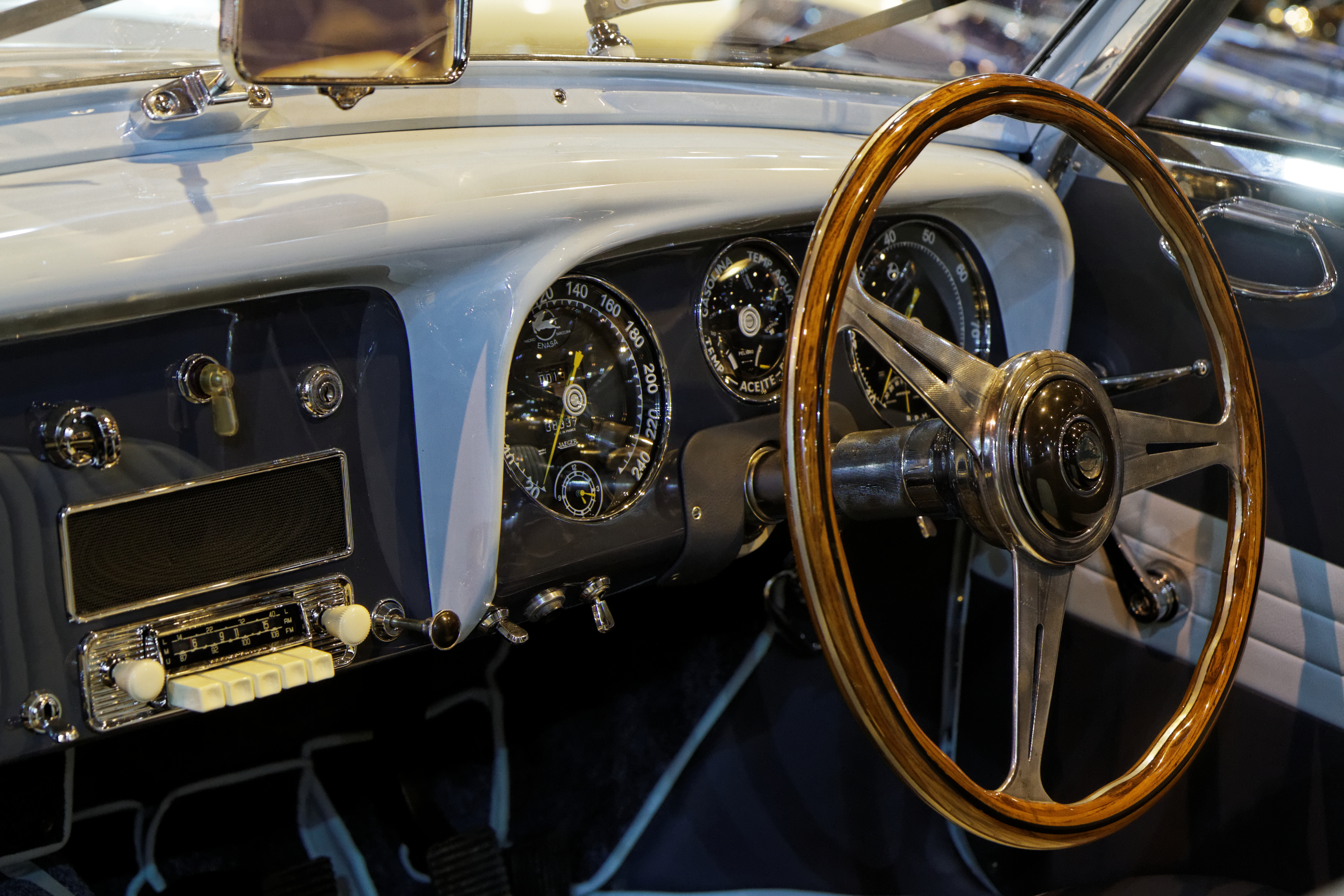 Une Pegaso Z-102 Cabriolet Saoutchik Série 2 exposée lors du salon Retromobile 2014